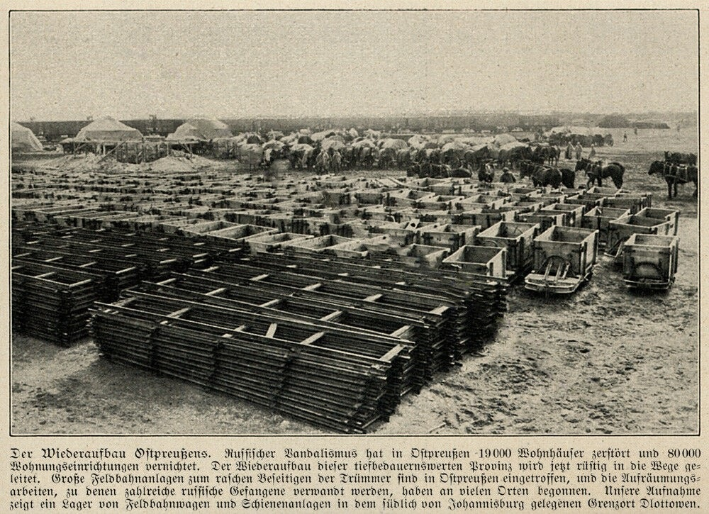 Der Wiederaufbau Ostpreußens. Originalzitat der Bildunterschrift von 1915: "Russischer Vandalismus hat in Ostpreußen 19000 Wohnhäuser zerstört und 80000 Wohnungseinrichtungen vernichtet. Der Wiederaufbau dieser tiefbedauernswerten Provinz wird jetzt rüstig in die Wege geleitet. Große Feldbahnanlagen zum raschen Beseitigen der Trümmer sind in Ostpreußen eingetroffen, und die Aufräumungsarbeiten, zu denen zahlreiche russische Gefangene verwandt werden, haben an vielen Orten begonnen. Unsere Aufnahme zeigt ein Lager von Feldbahnwagen und Schienenanlagen in dem südlich von Johannisburg gelegenen Grenzort Dlottowen."